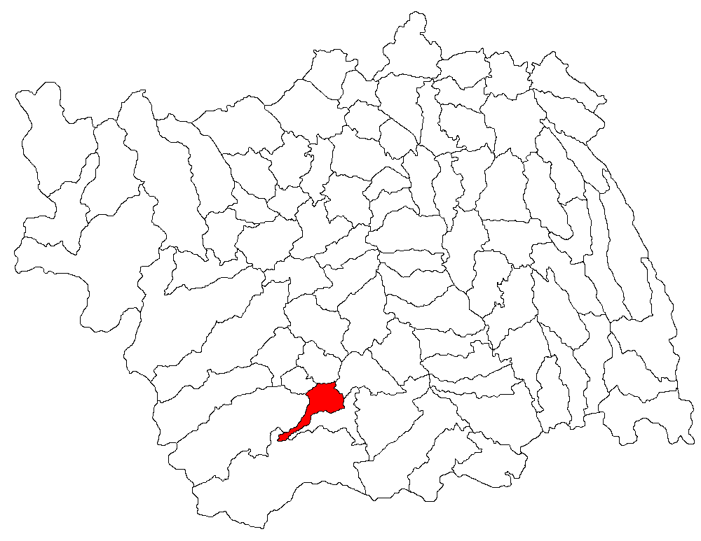 Categorie:Hărţi ale judeţului Bacău